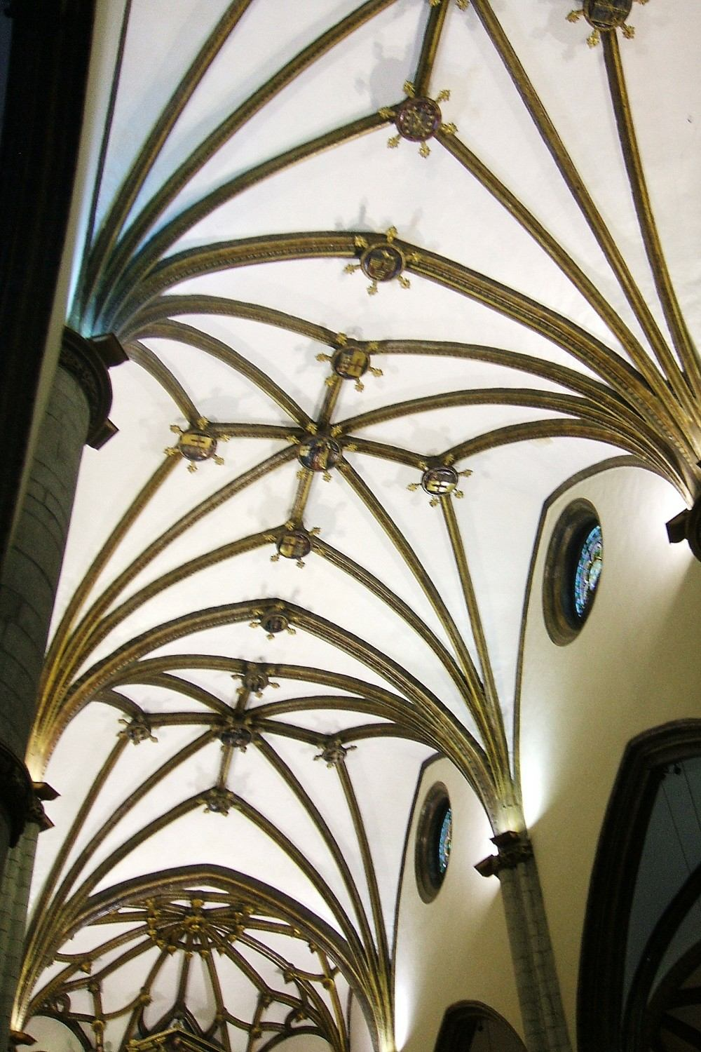 Bóvedas de la nave central de la iglesia de San Miguel Arcángel, Vitoria-Gasteiz